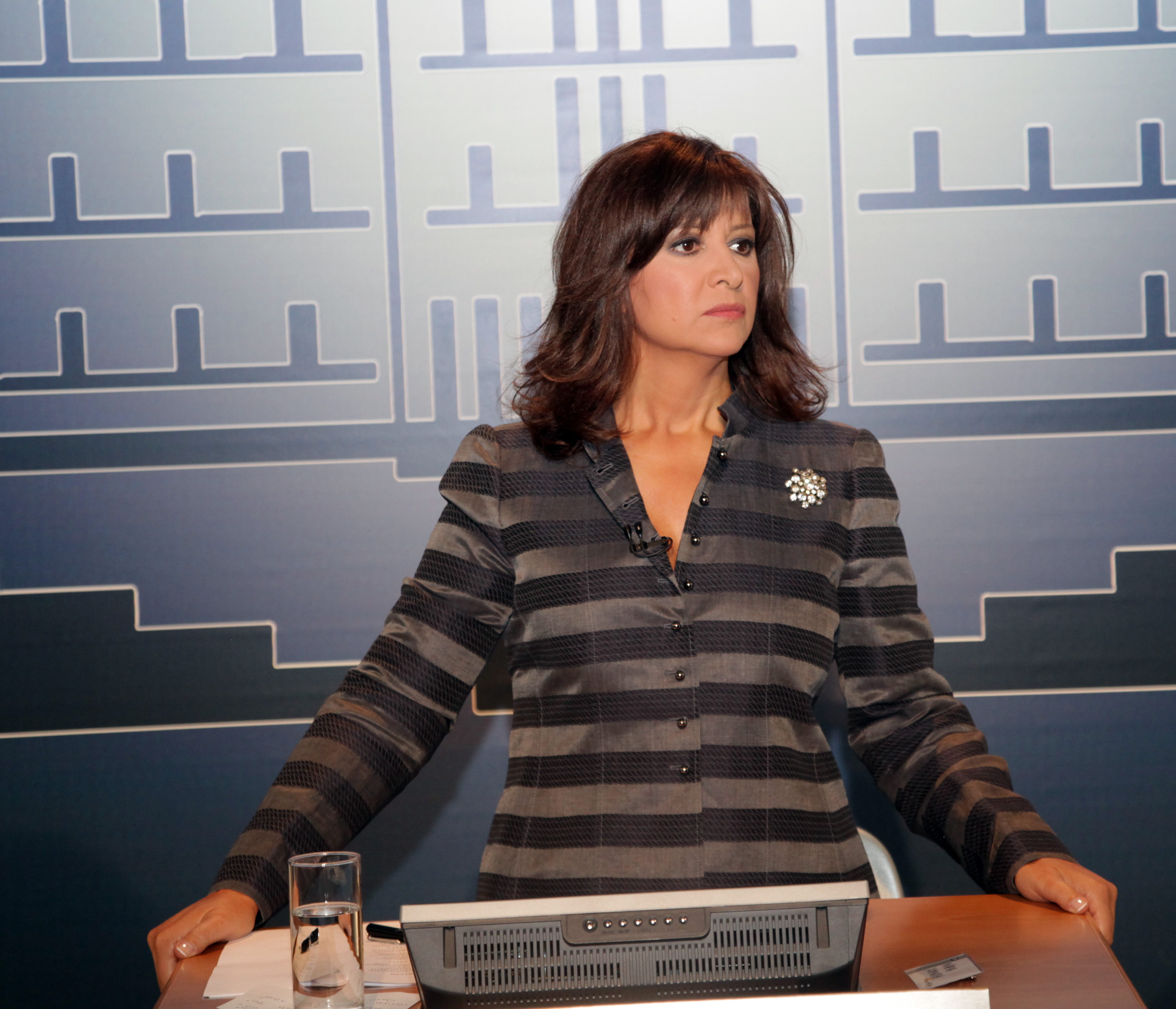 Μαρία Χούκλη, δημοσιογράφος